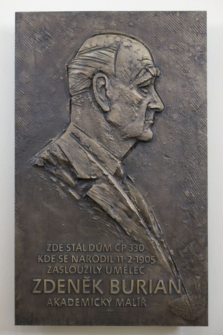 Pamětní deska Zdeňka Buriana umístěná v prostorách Lašského muzea